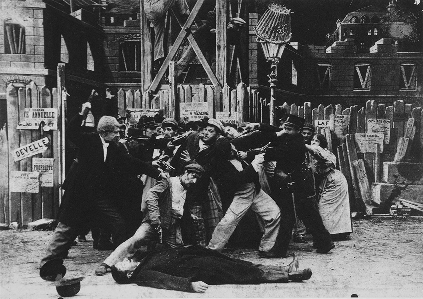 Promotional still of the lost film La Civilisation à travers les âges by George Melies.